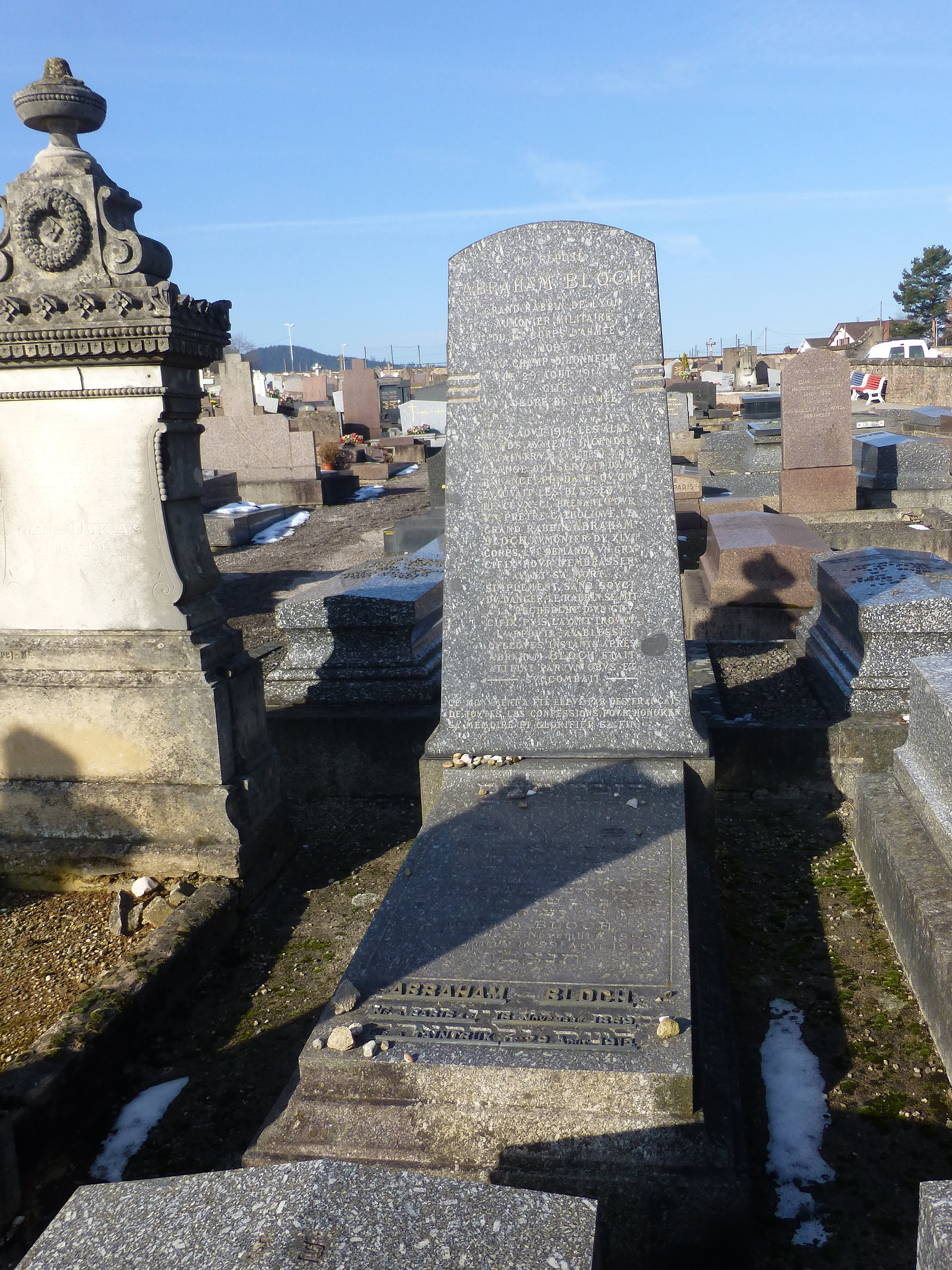 Tombe du rabbin Abraham Bloch au cimetière de la rive droite de Saint-Dié-des-Vosges